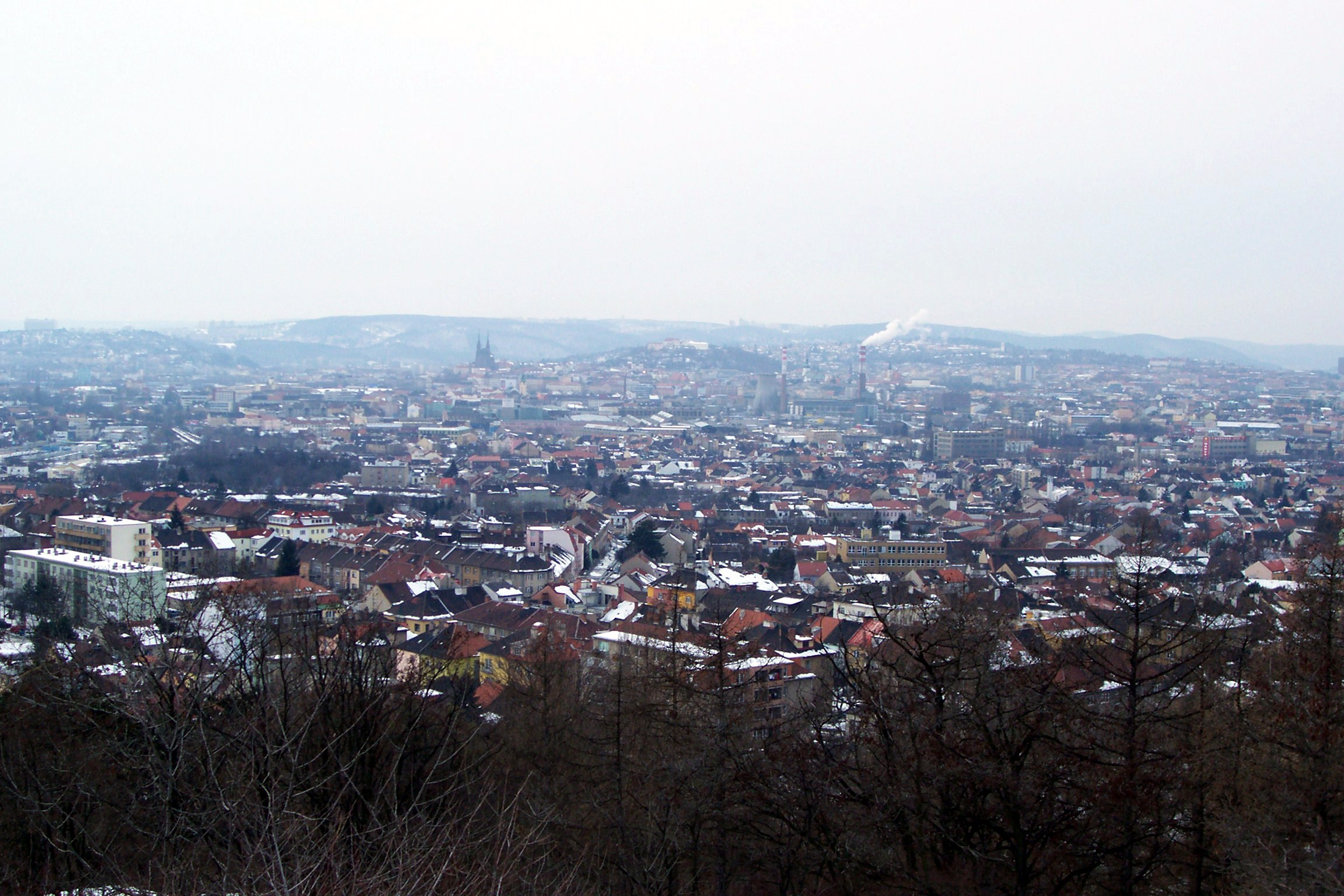 Celkový pohled na Brno - Global view of Brno Vyfotografováno z Bílé hory na území brněnské městské části Brno-Židenice, katastrální území Židenice. Photographed from Bílá Hora, in the territory of Brno's city district of Brno-Židenice, cadastral area of Židenice.